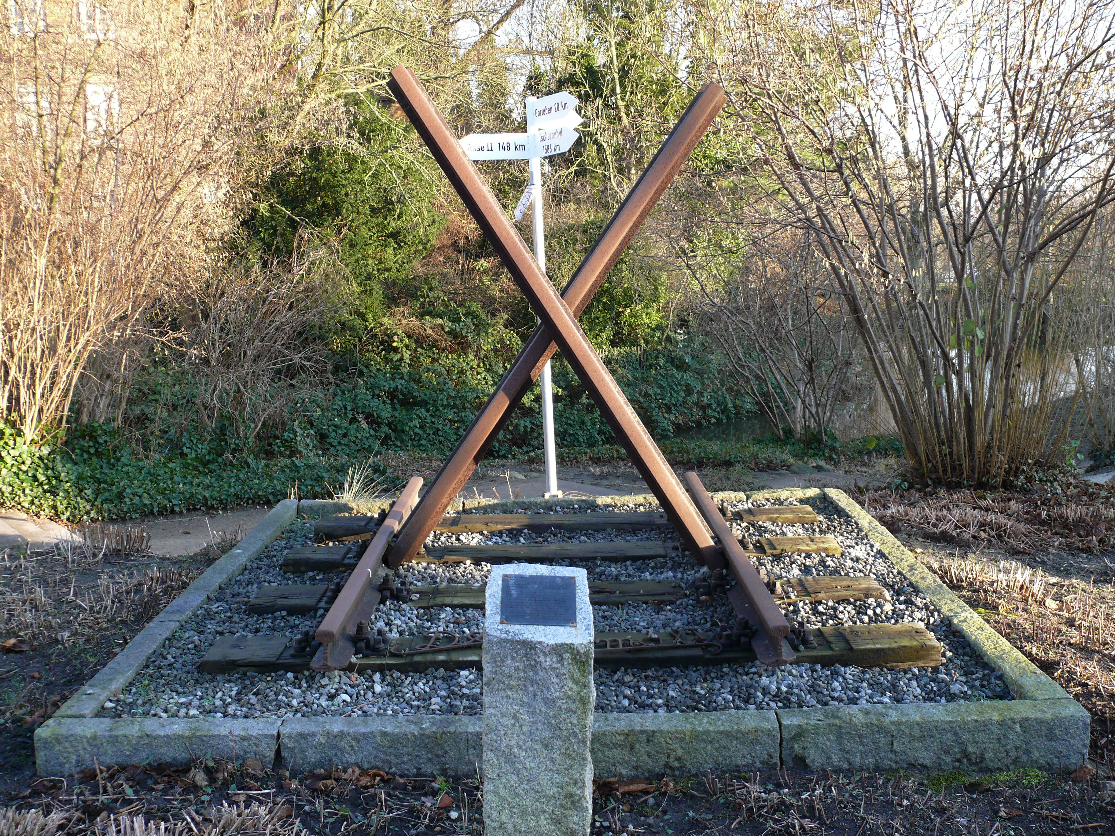 Das X-Denkmal auf dem Parkplatz vor dem Amtsberg in Dannenberg (Elbe), als Zeichen des lebendigen Protest gegen die Atomkraft und der Betroffenheit während der zahlreichen Castor-Transporte ins nahe Gorleben.